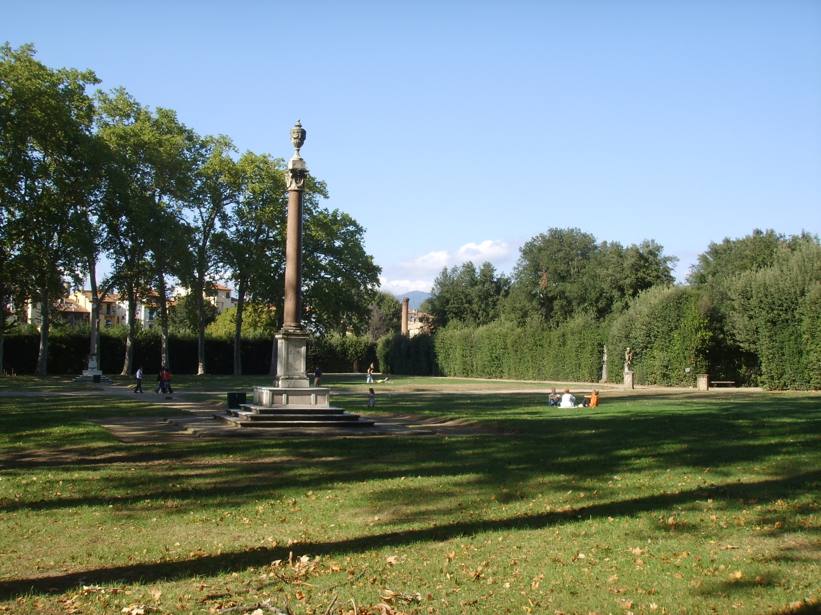 Boboli, emiciclo